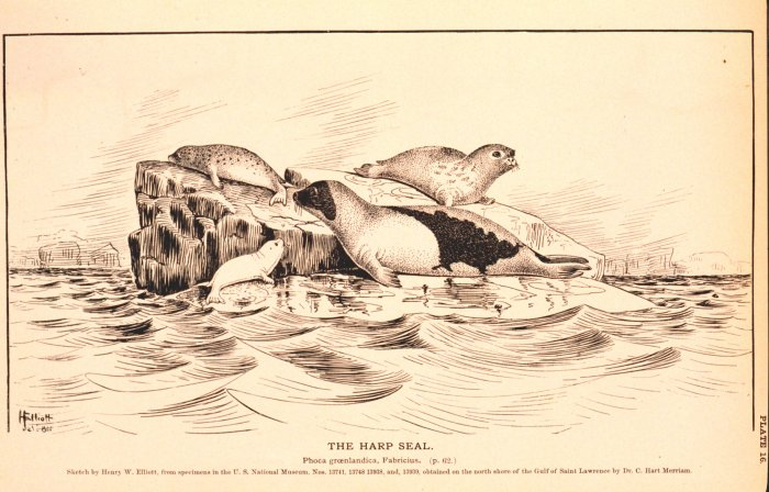 Männchen, Weibchen und Jungtier